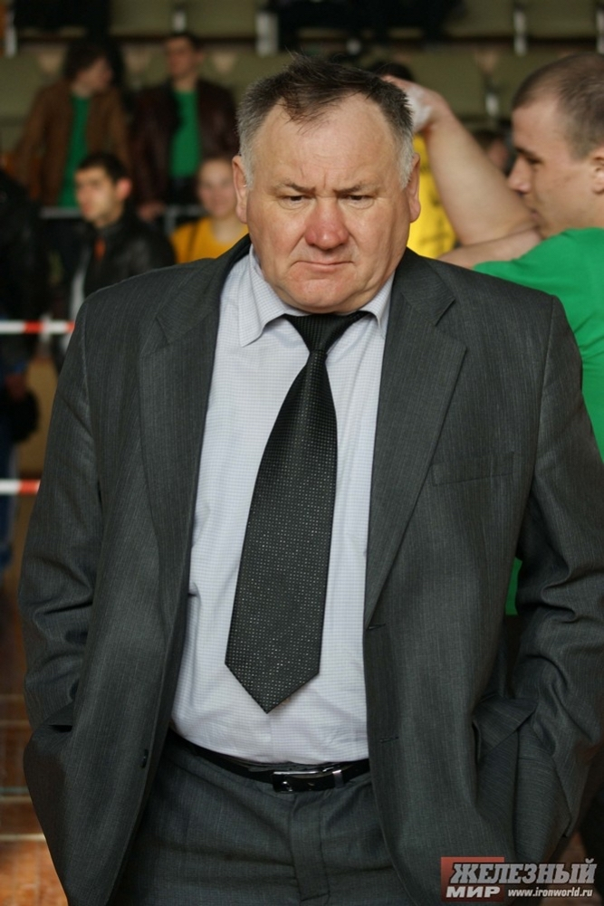 Сергій Миколайович Олійник президент Полтавської федерації армспорту, член правління Української федерації армспорту